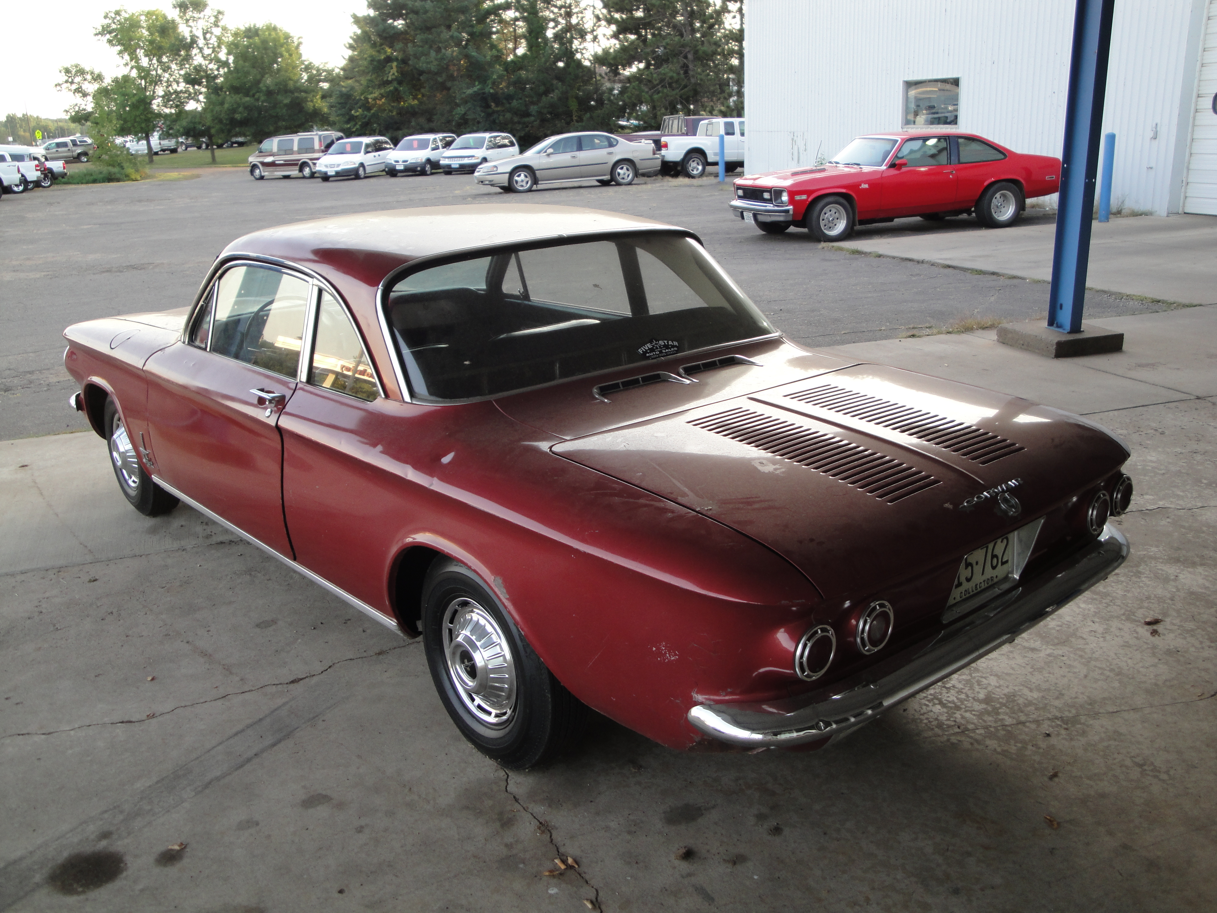 62 Chevrolet Corvair Spyder